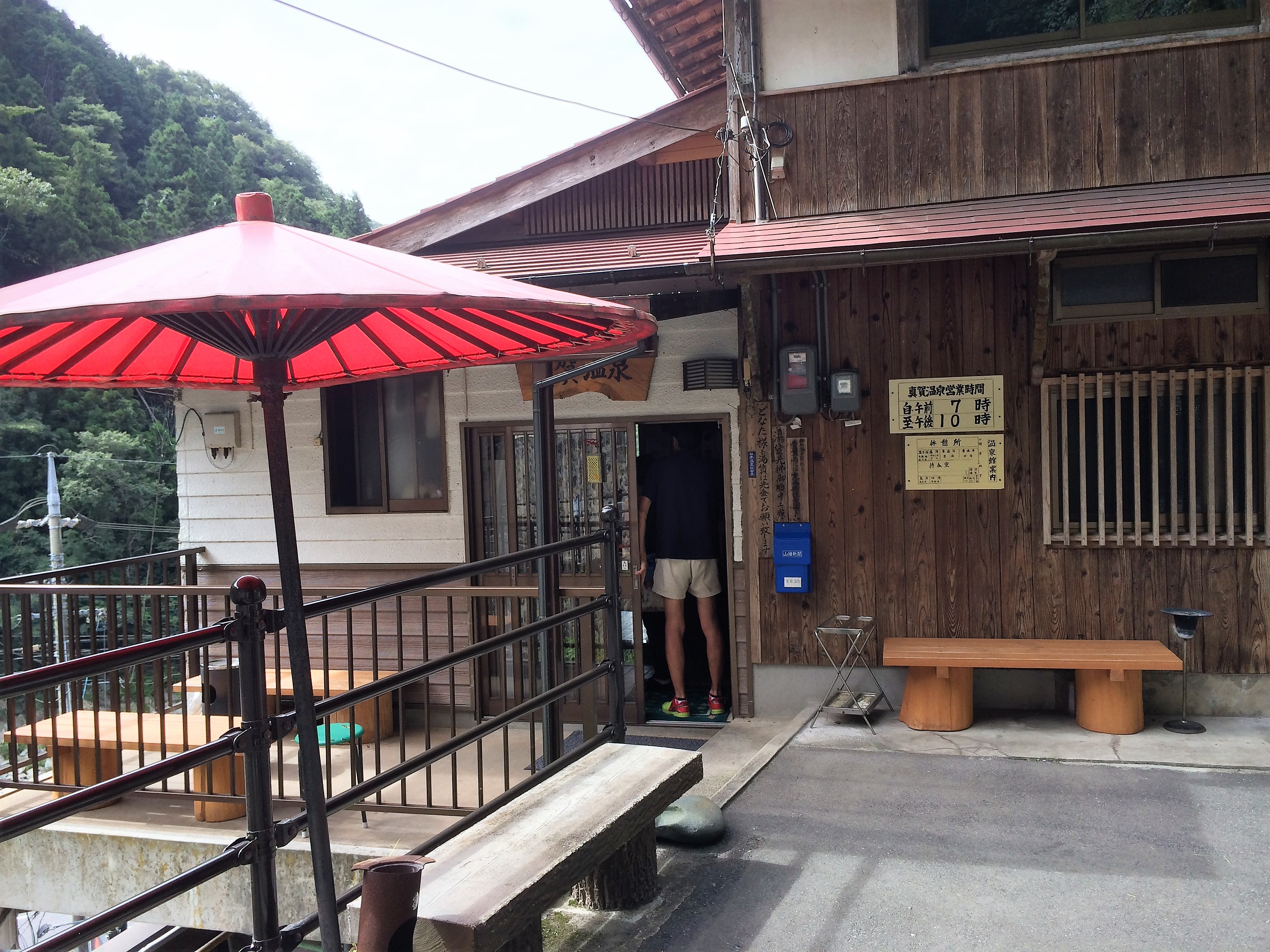 真賀温泉館入口。岡山県真庭市仲間180 2014年撮影。